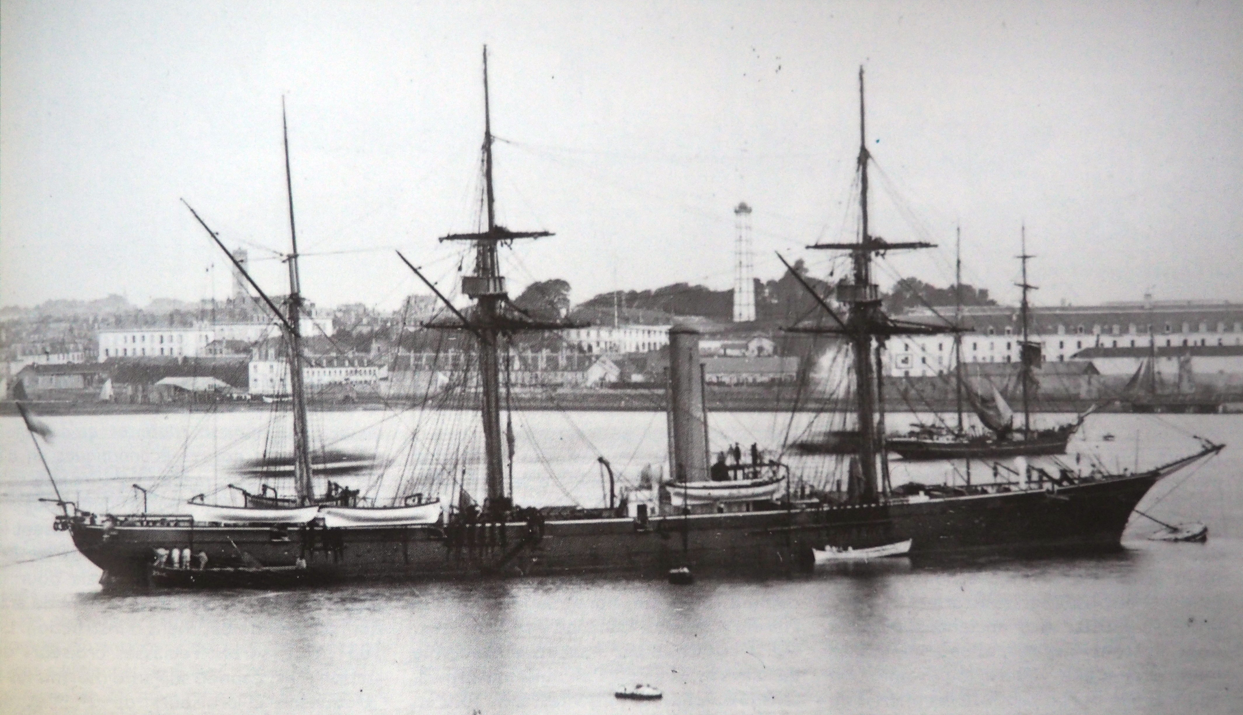 French cruiser Châteaurenault in Lorient